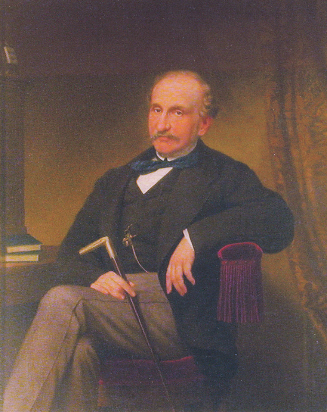 Girolamo Salvi